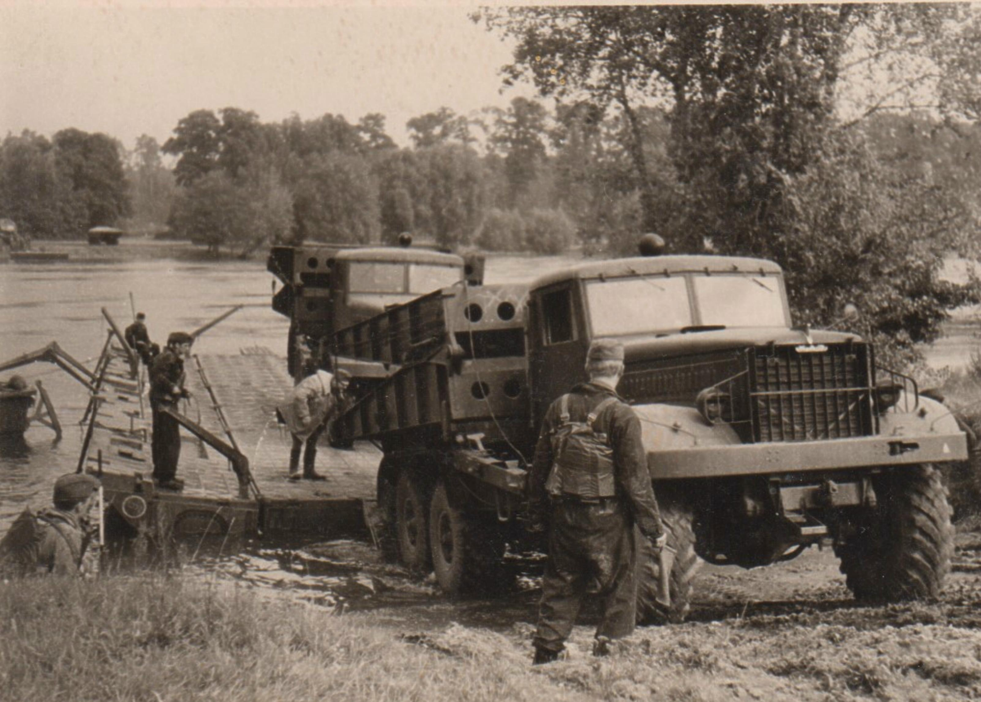 Pirna.Wasserplatz im Jahr 1967.Übersetzen der schweren mechanisierten Brücke TMM/TMM-3 über eine Pontonpark PMP-Fähre